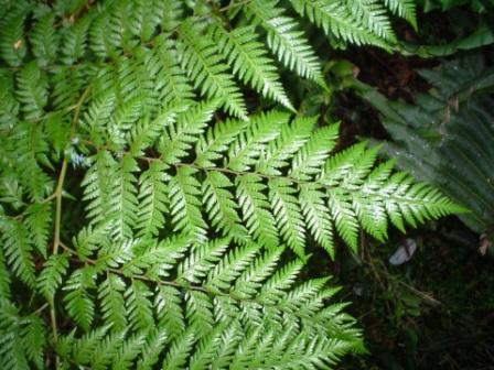 Parte de una fronda de ampe o palmilla {Lophosoria quadripinnata en Pupetra, Dalcahue, Chiloé, Chile